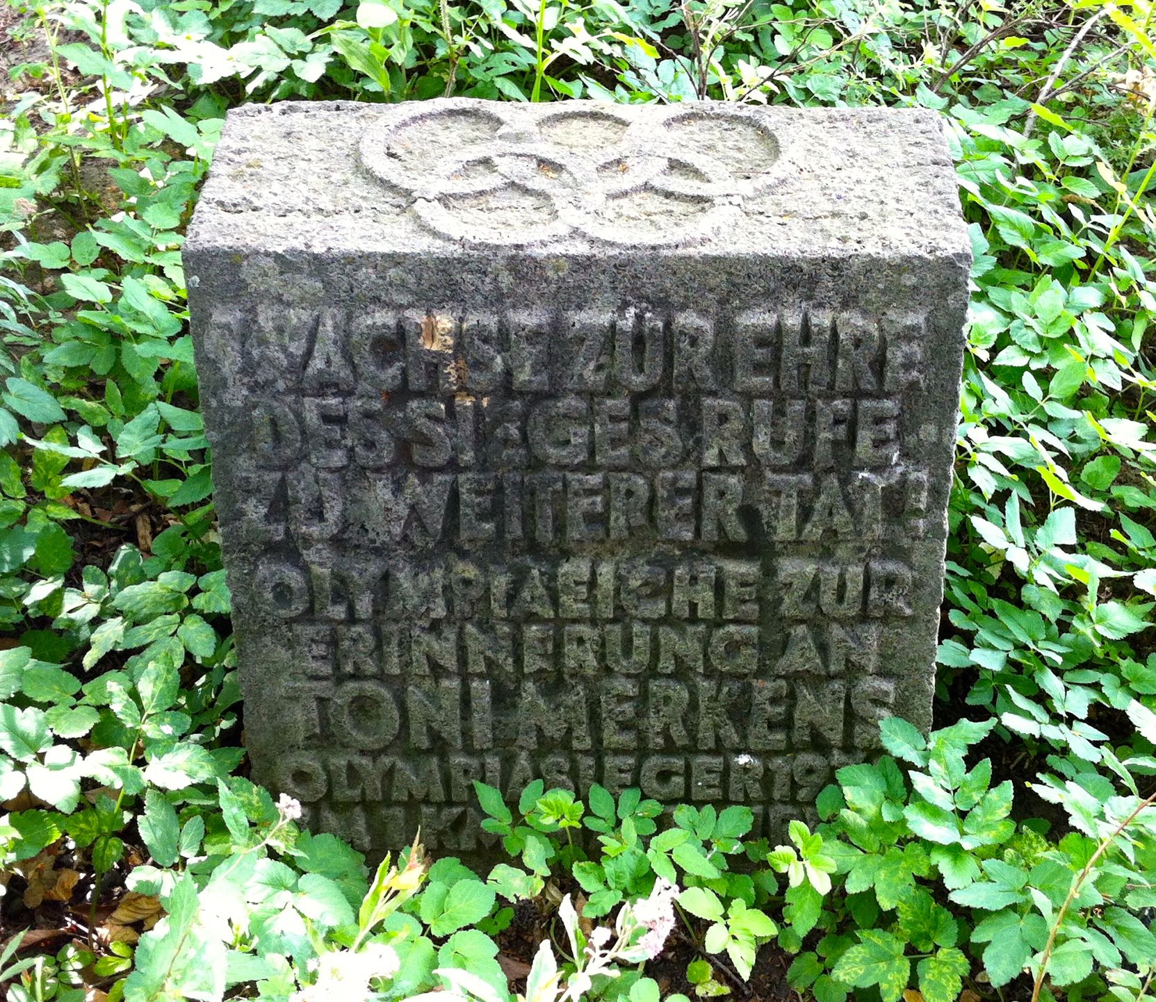 Gedenkstein Toni Merkens im Sportpark Köln-Müngersdorf